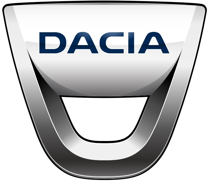 Das neue Logo der SC Automobile Dacia, seit 2009, selbst fotografiert am eigenen PKW.